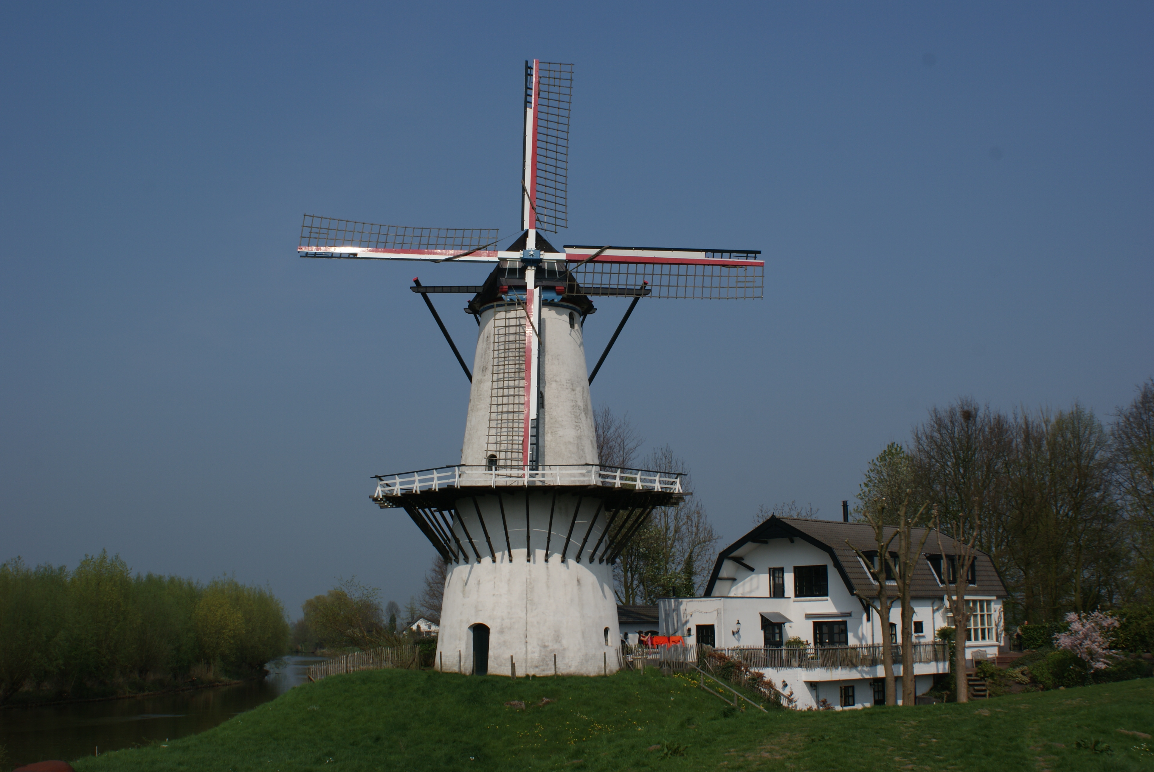 Tussen Deil en Enspijk langs de Linge. Windmill "The Butterfly", between Deil and Enspijk along the river Linge.